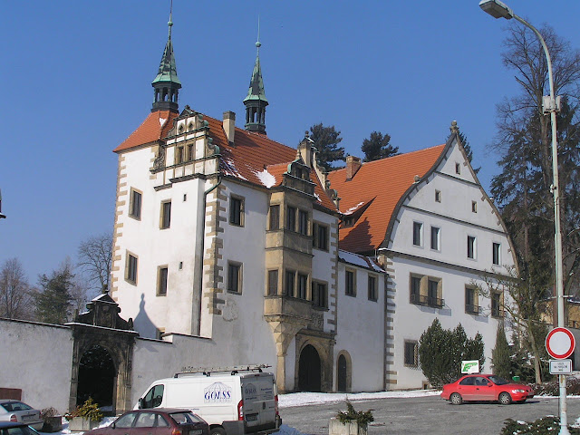 Zámek Horní a Dolní Benešov nad Ploučnicí, Zámecká, nám. Míru 47, Benešov nad Ploučnicí